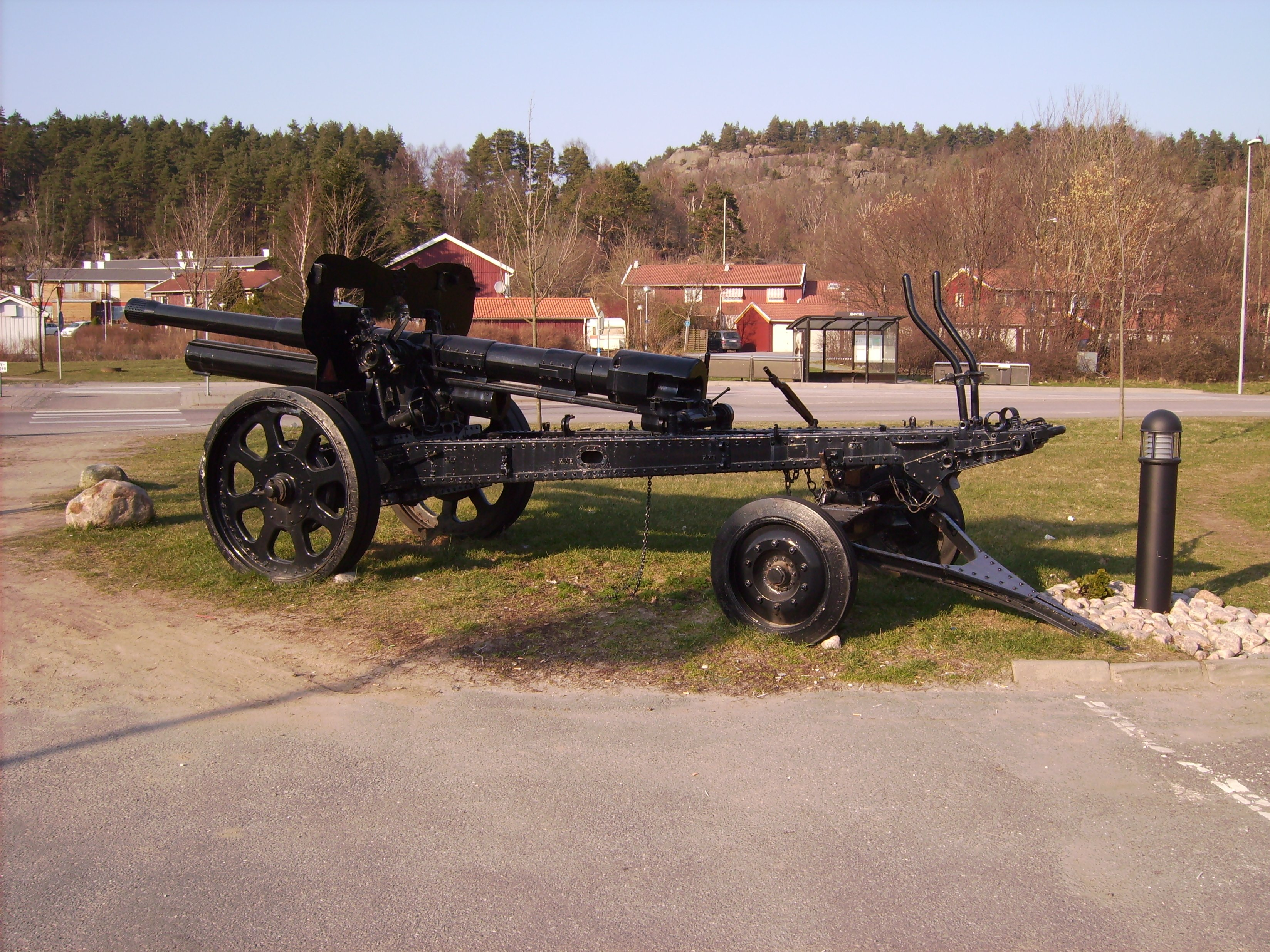 Bilden är fotograferad av Harri Blomberg. Photo by Harri Blomberg.